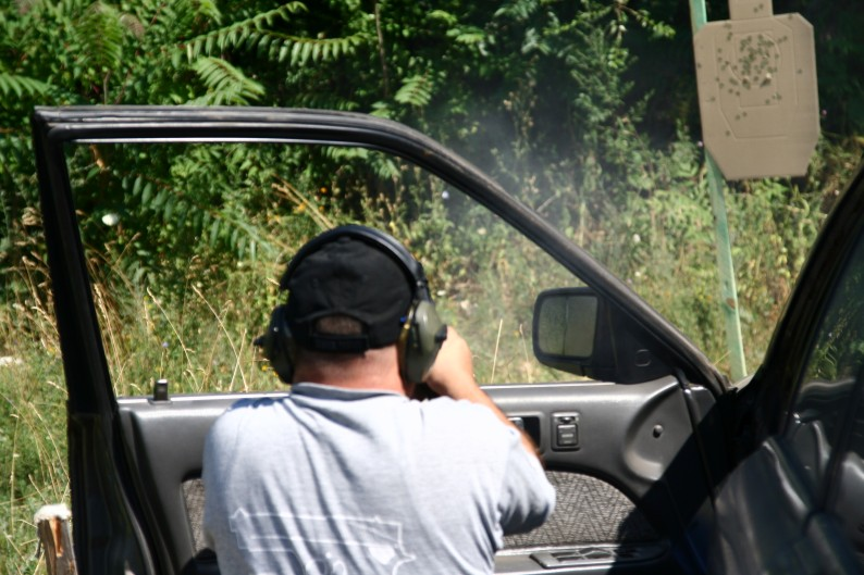 IDPA verseny (Bel SE rendezésében)